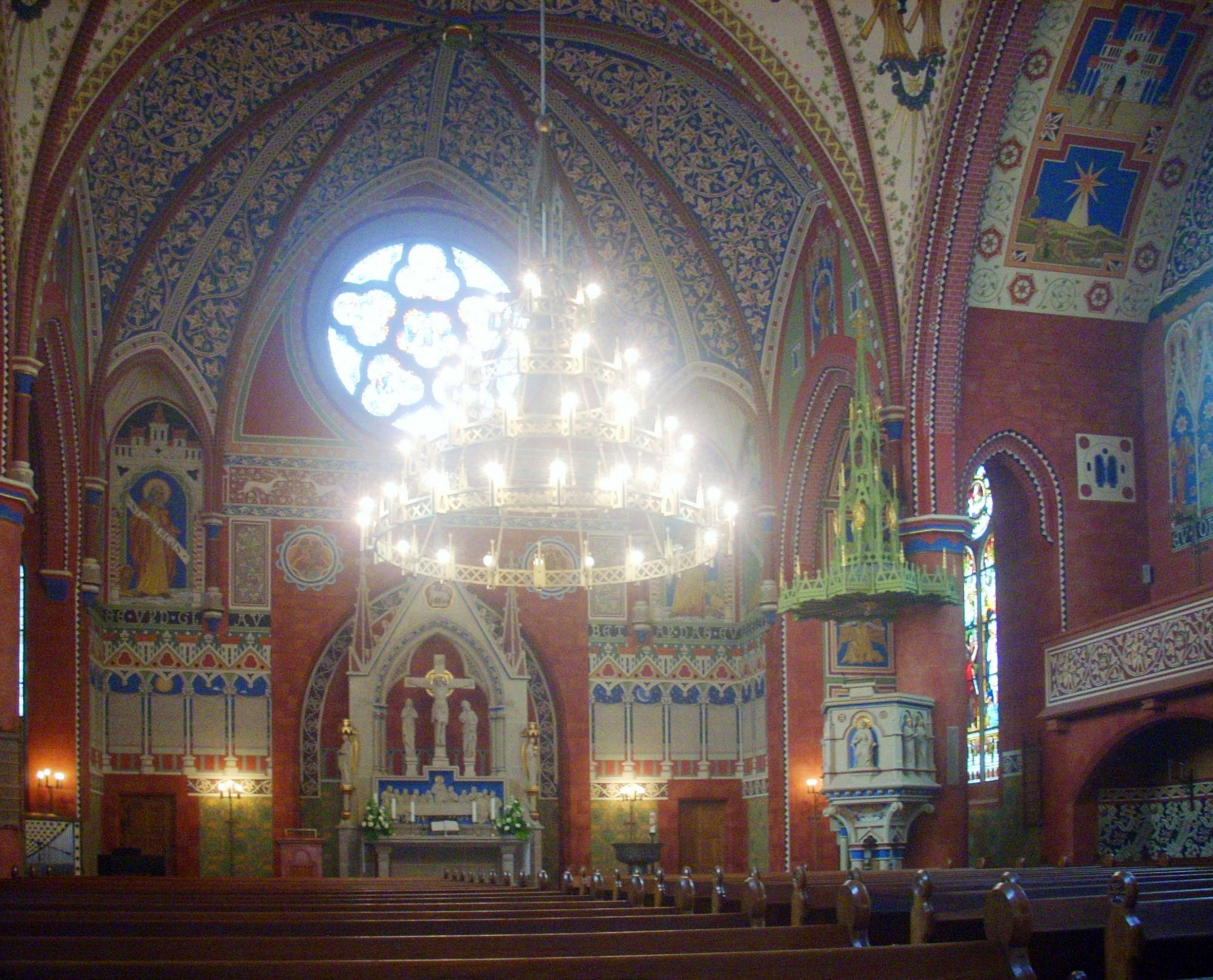 Peine, St.-Jakobi-Kirche, Inneres